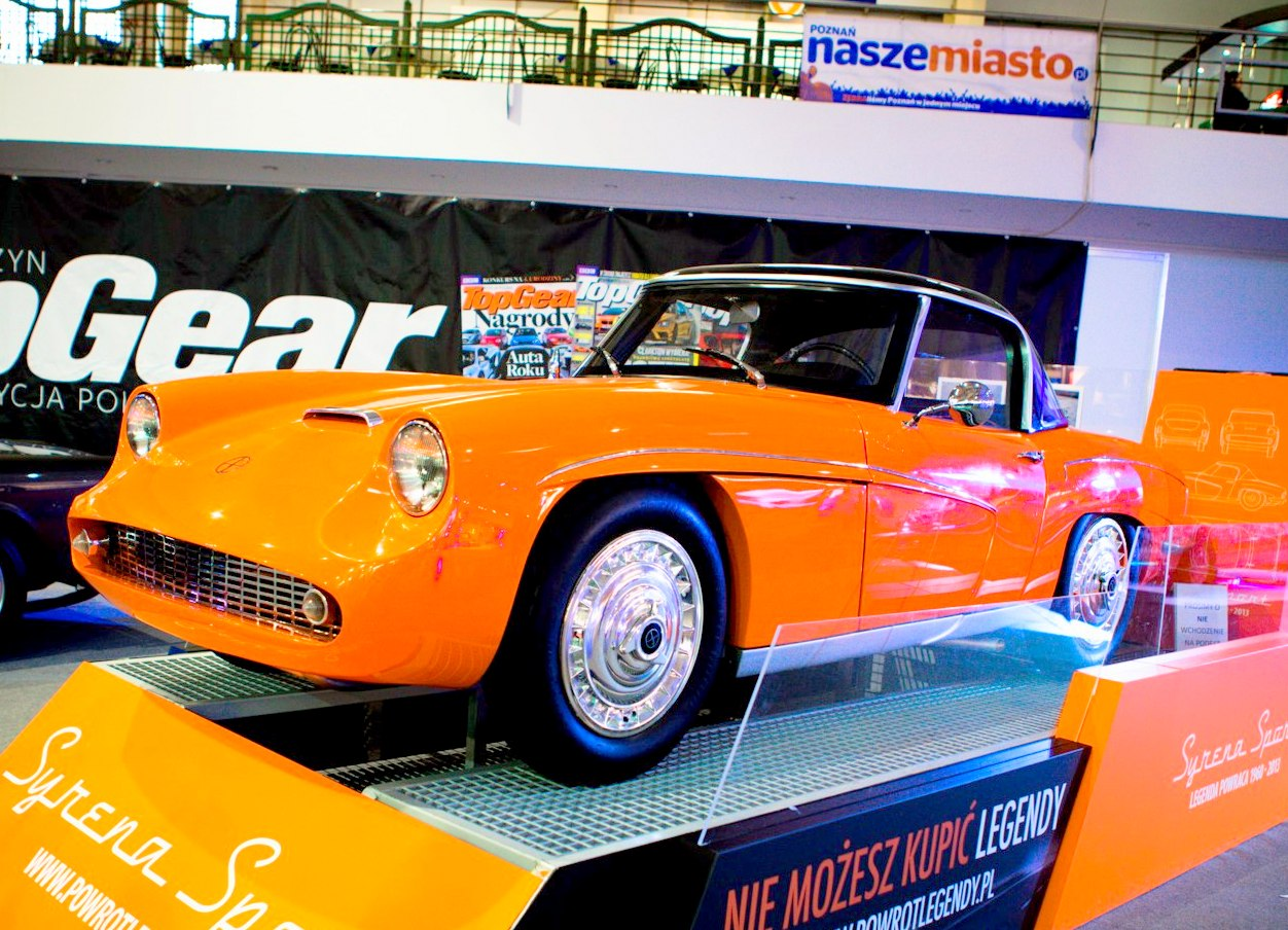 Replika FSO Syrena Sport przygotowana przez producenta wódki Żołądkowej Gorzkiej zaprezentowana podczas Poznań Motor Show 2013